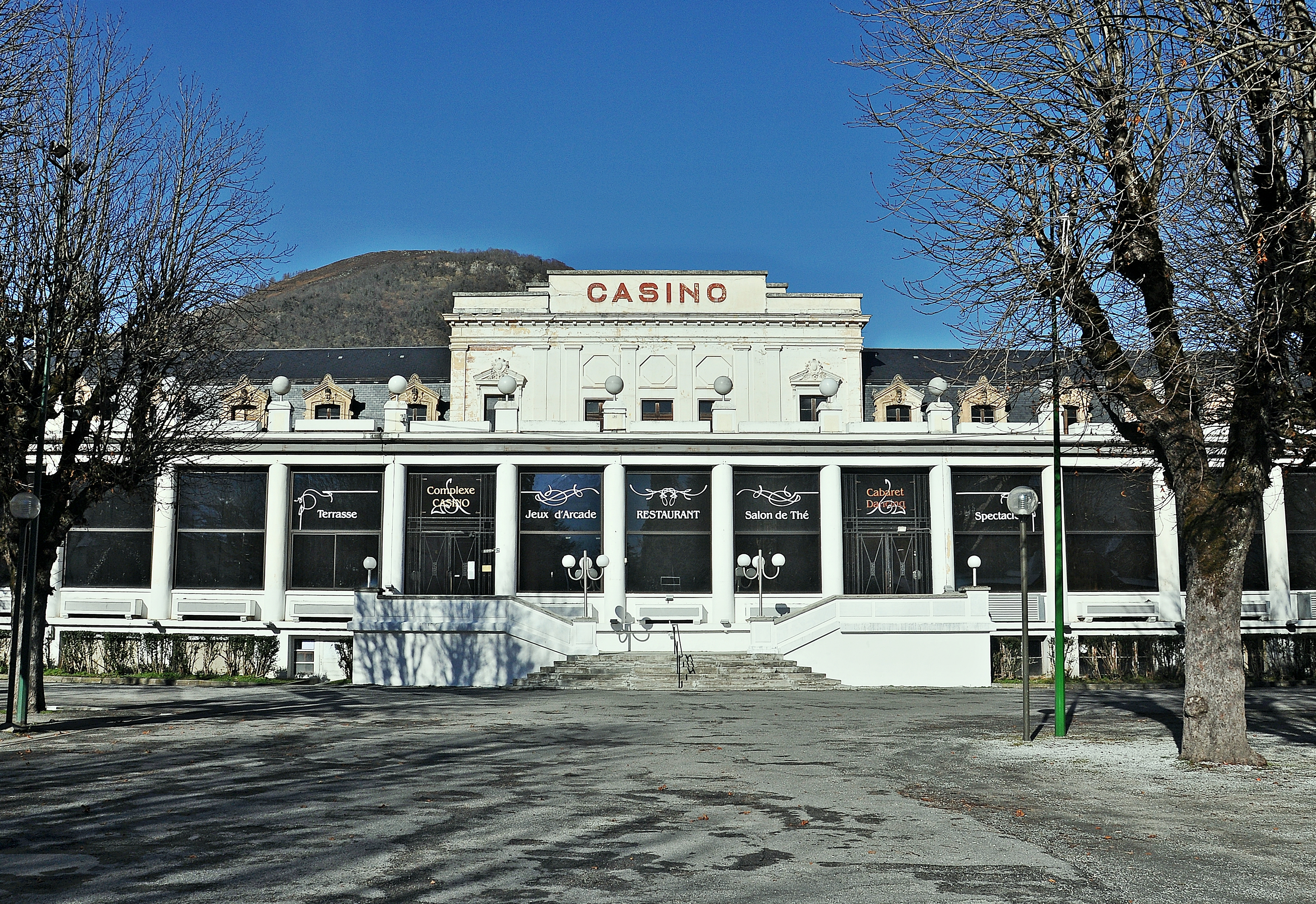 Alto Garona-Francia